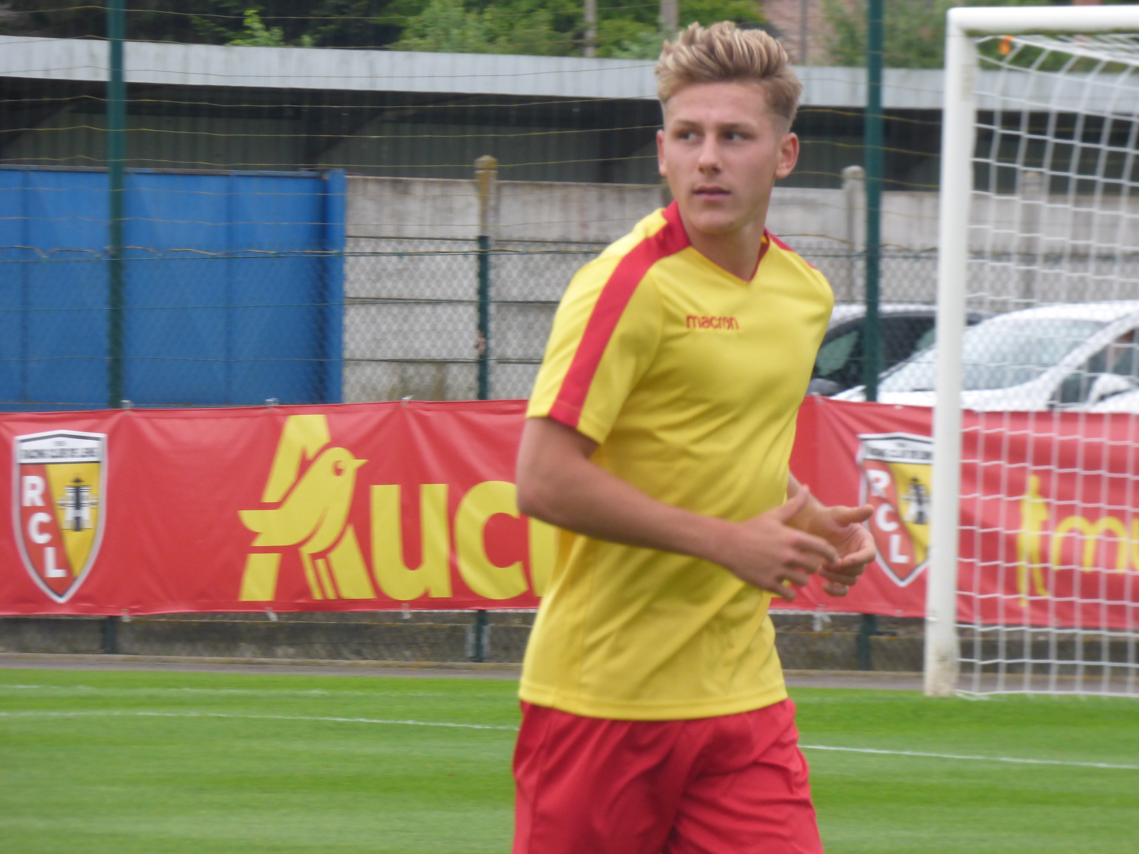 Benjamin Gomel lors d'un entraînement public du Racing Club de Lens, le 19 juin 2018, au centre technique et sportif de La Gaillette à Avion.